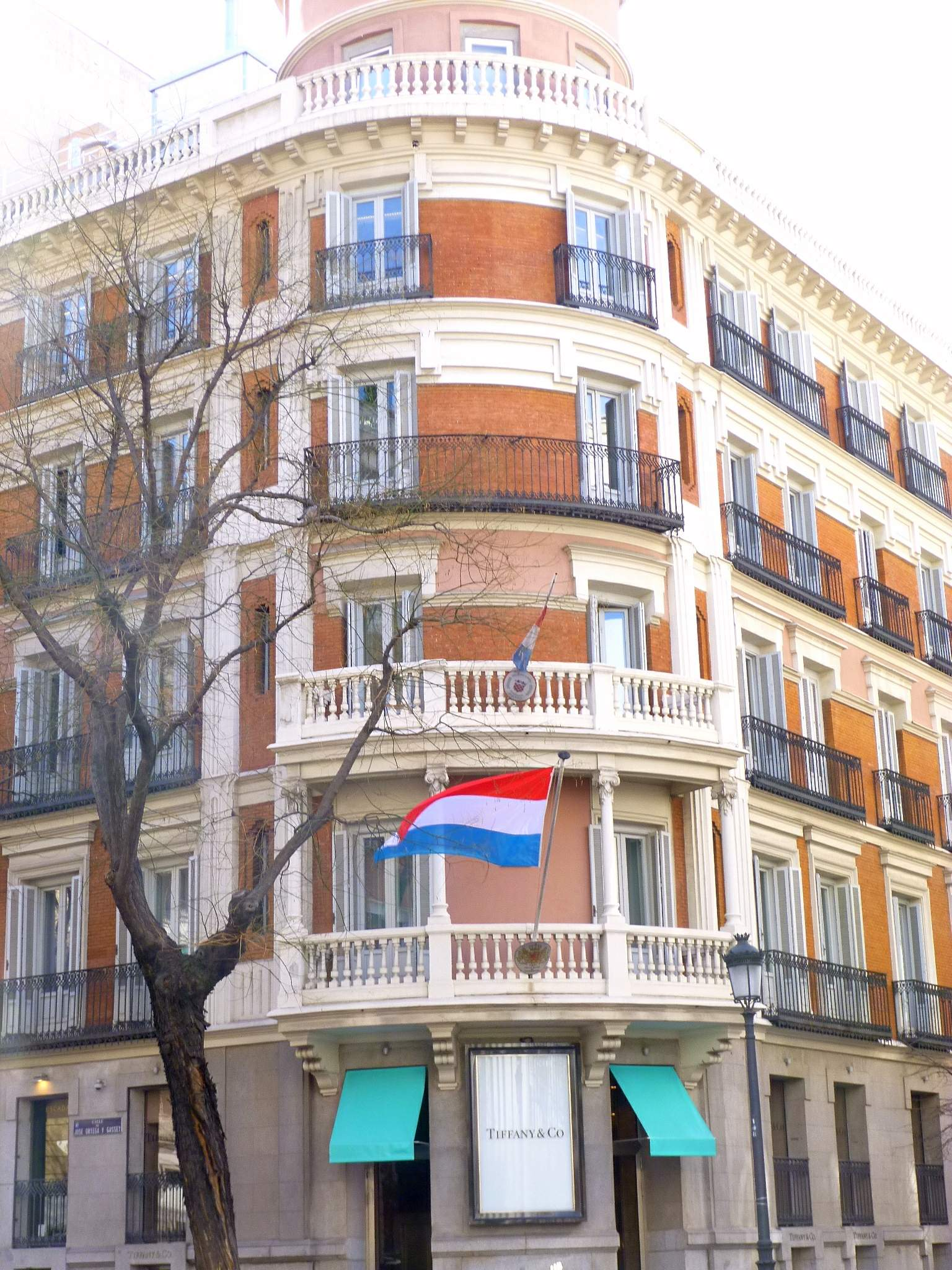 Embajada de Croacia en Madrid